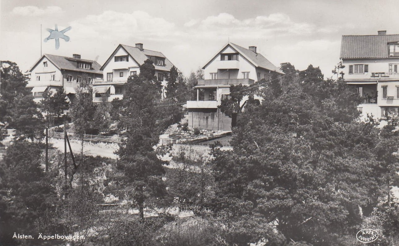 Äppelbovägen, Höglandet, södra Bromma, vykort, troligen 1950-talet. De flesta av villorna på Äppelbovägen är byggda 1934 och 1935, någon villa är byggd år 1940 och de har utsikt över Mälaren.